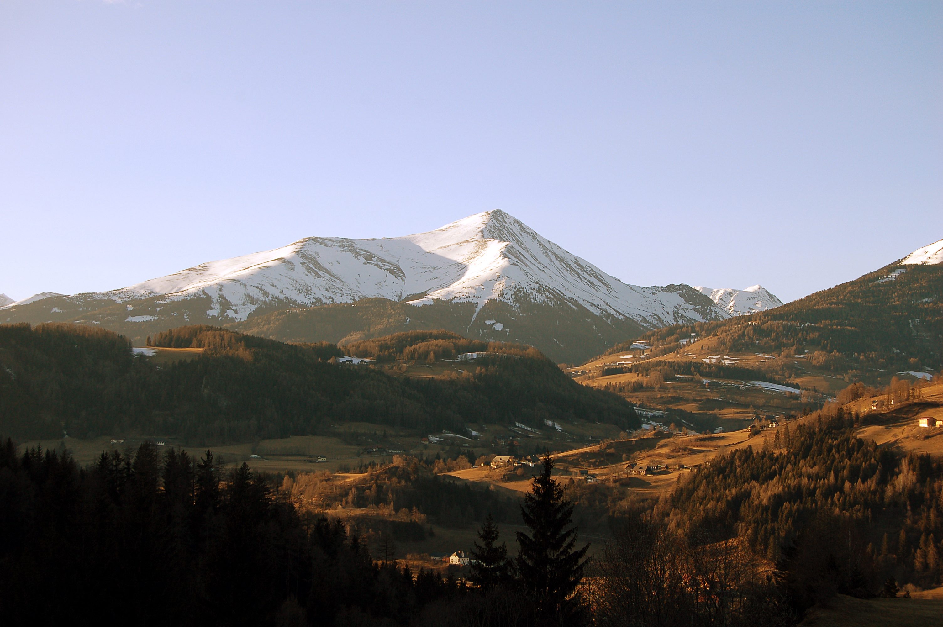 Greim (2474m), nördlich von St. Peter am Kammersberg in der Steiermark